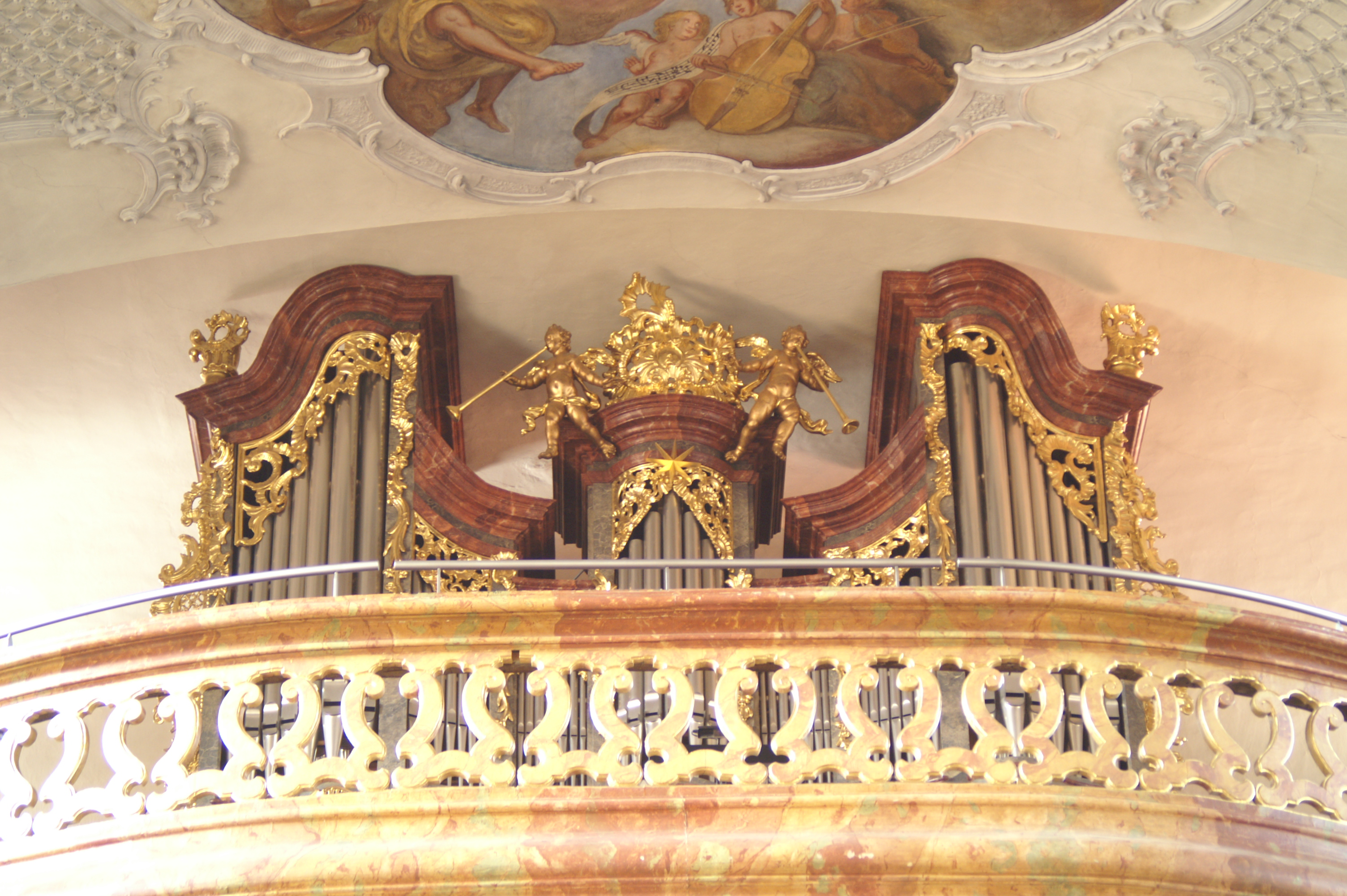 Orgel de Kirche Maria Himmelfahrt in Berching